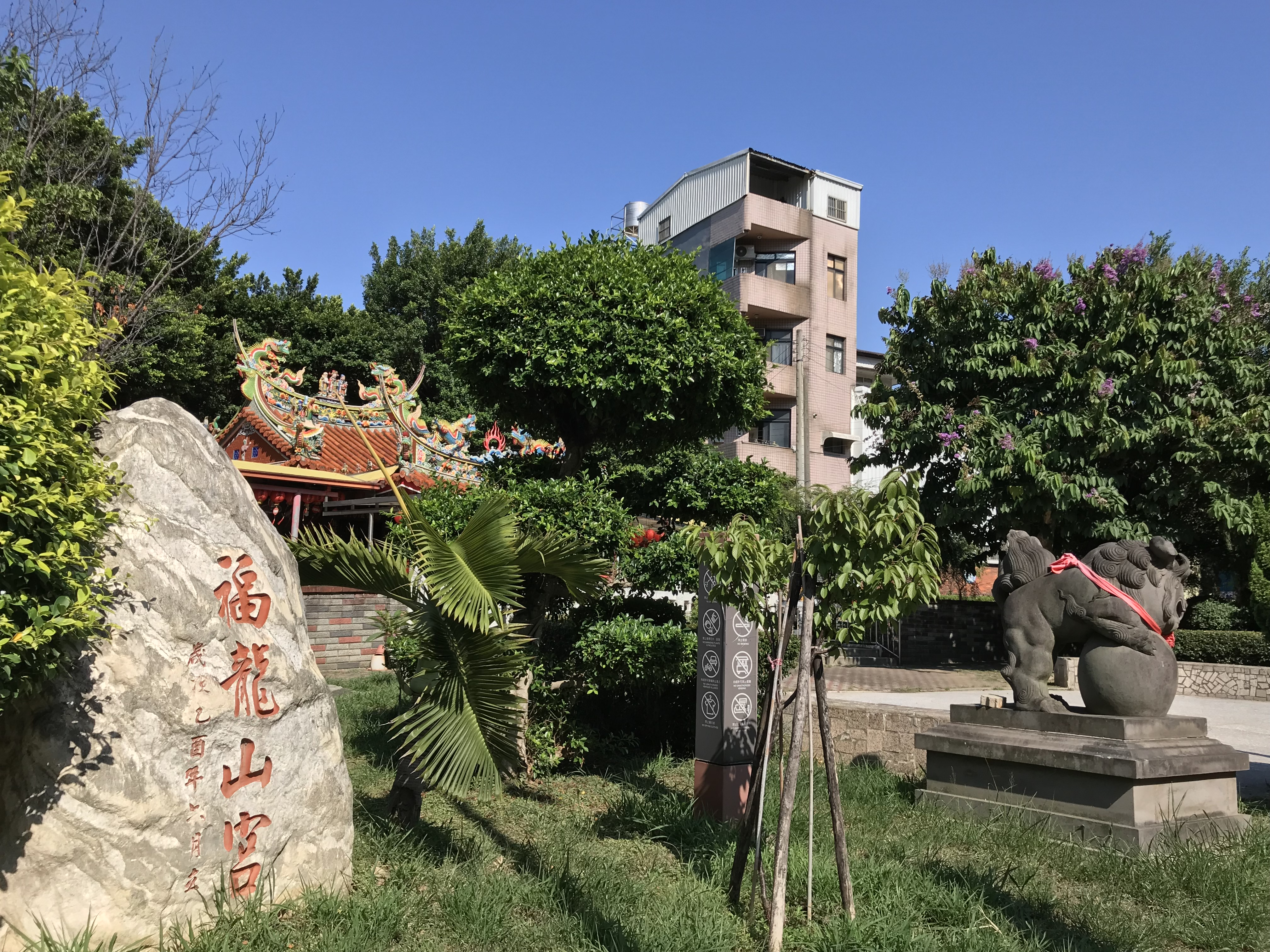 福龍山宮前的廟名碑與石獅。